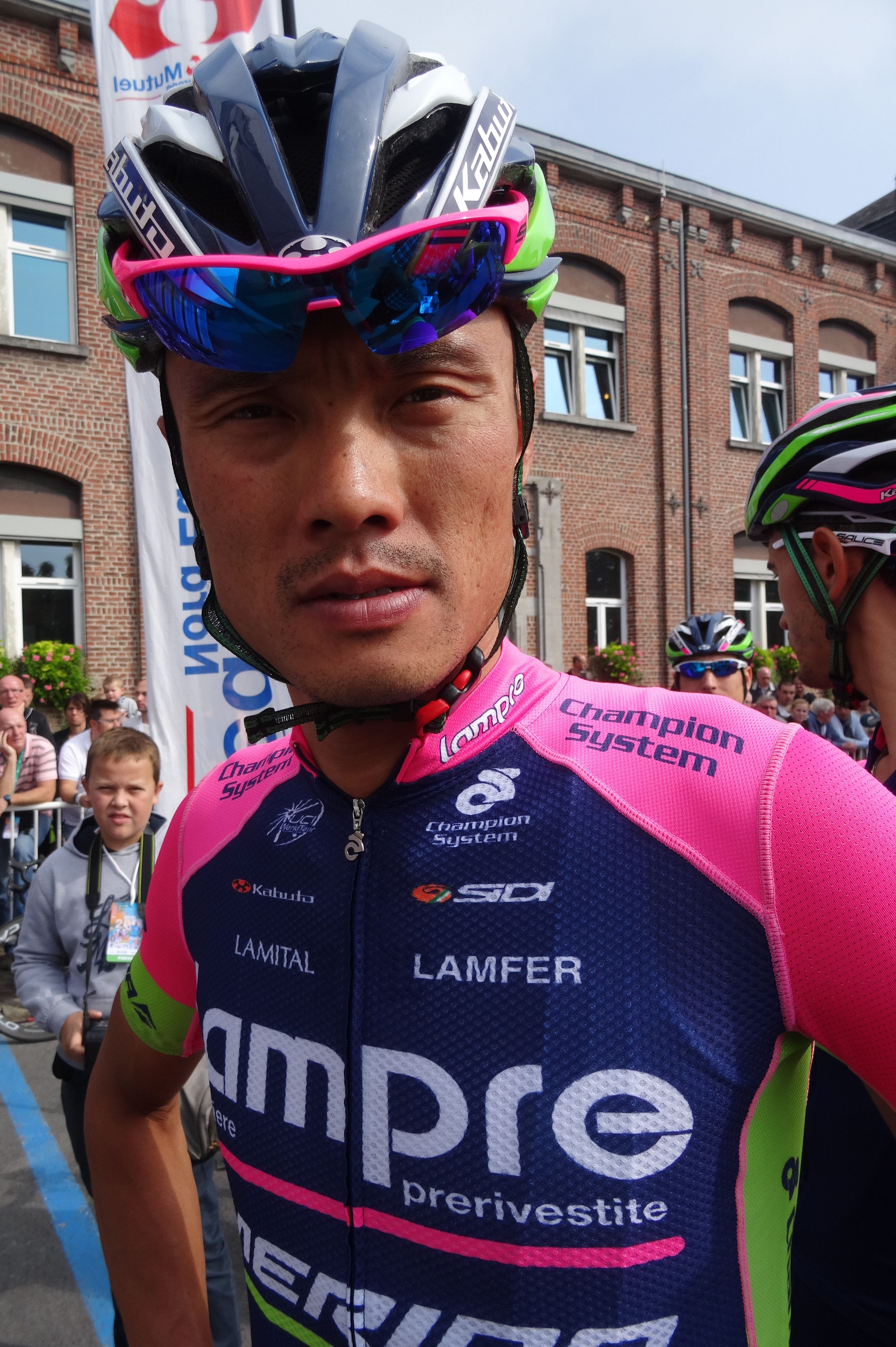 Reportage photographique réalisé le dimanche 7 septembre à l'occasion du départ et de l'arrivée du Grand Prix de Fourmies 2014 à Fourmies, Nord-Pas-de-Calais, France.